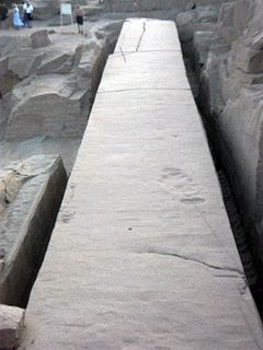 El obelisco inacabado, en la cantera de Asuán, Egipto